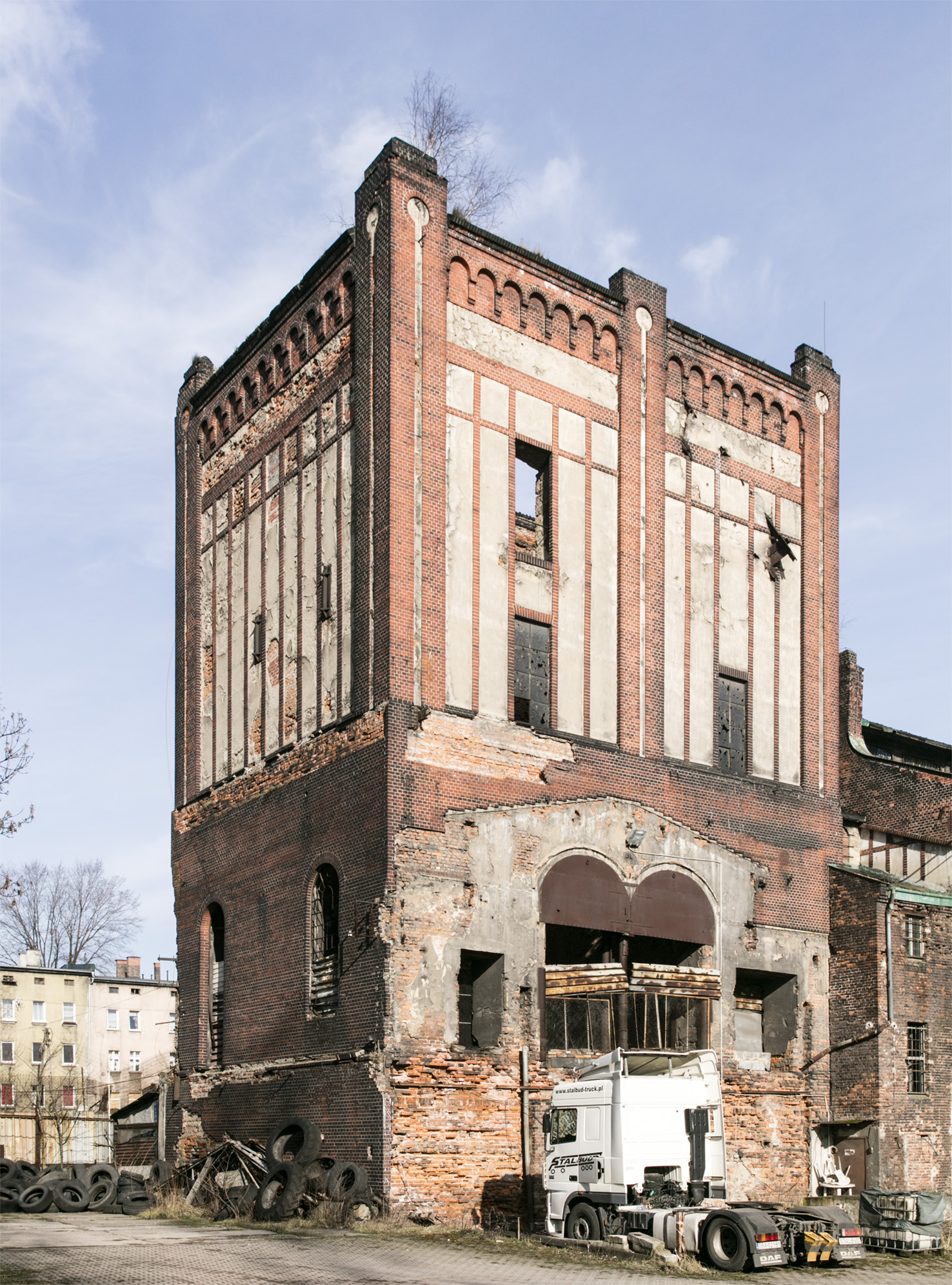 Niederschlesien Bergwerk Victoria Schwesterschacht I